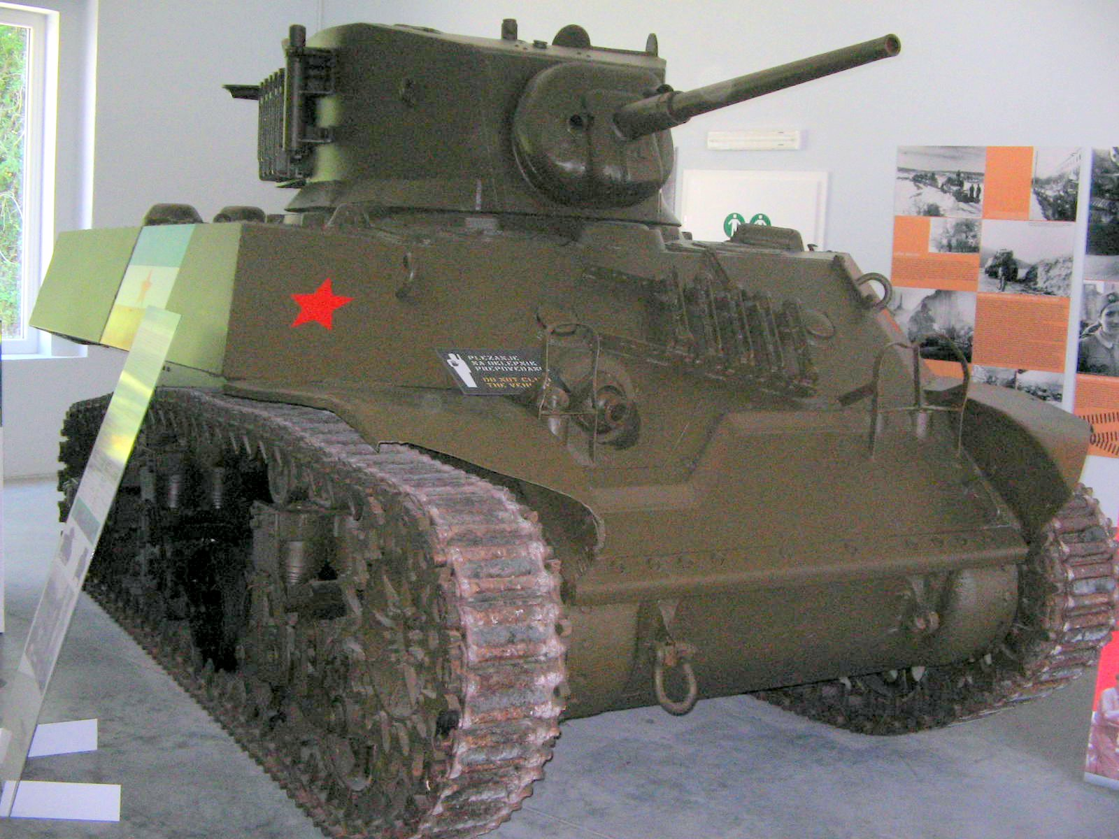 Park of Military History, Pivka, Slovenija